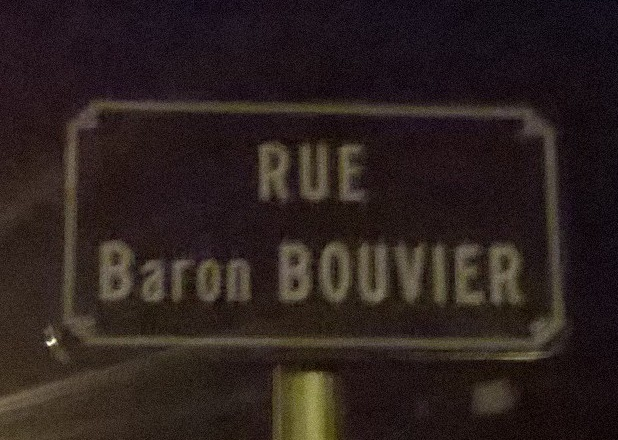 Panneau de la rue Baron Bouvier (Vesoul)